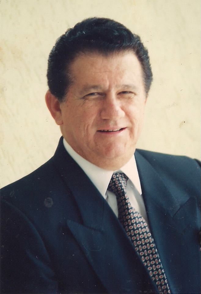 Retrato de Manuel Félix López como legislador en 1992